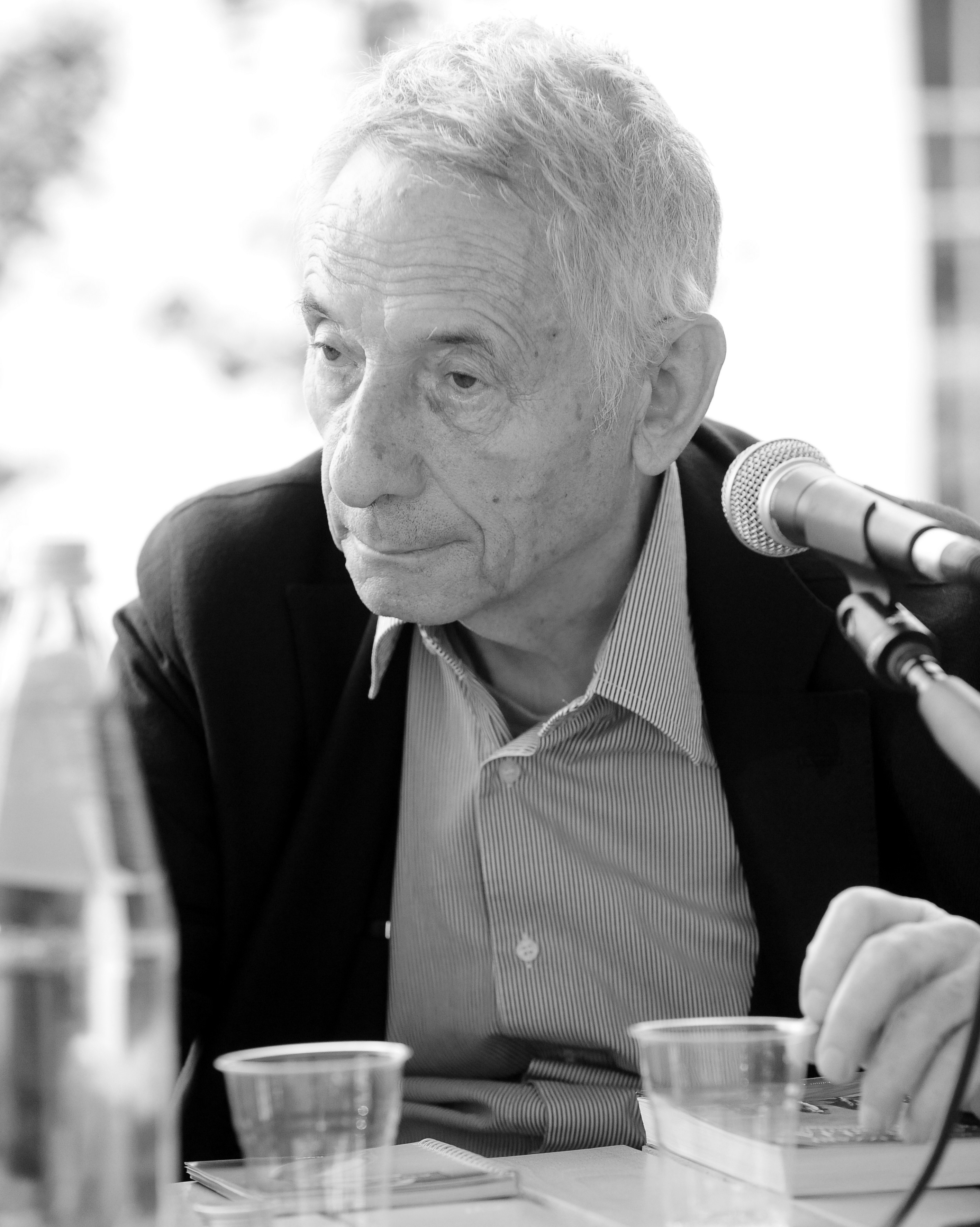 Mario Dondero a Mantova per il Festivaletteratura 2012.